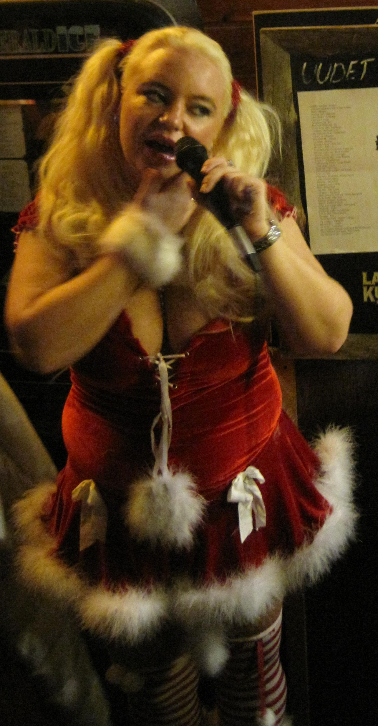 Johanna Tukiainen esiintymässä Kannel Pubissa, Kannelmäessä, Helsingissä 11. joulukuuta 2010.